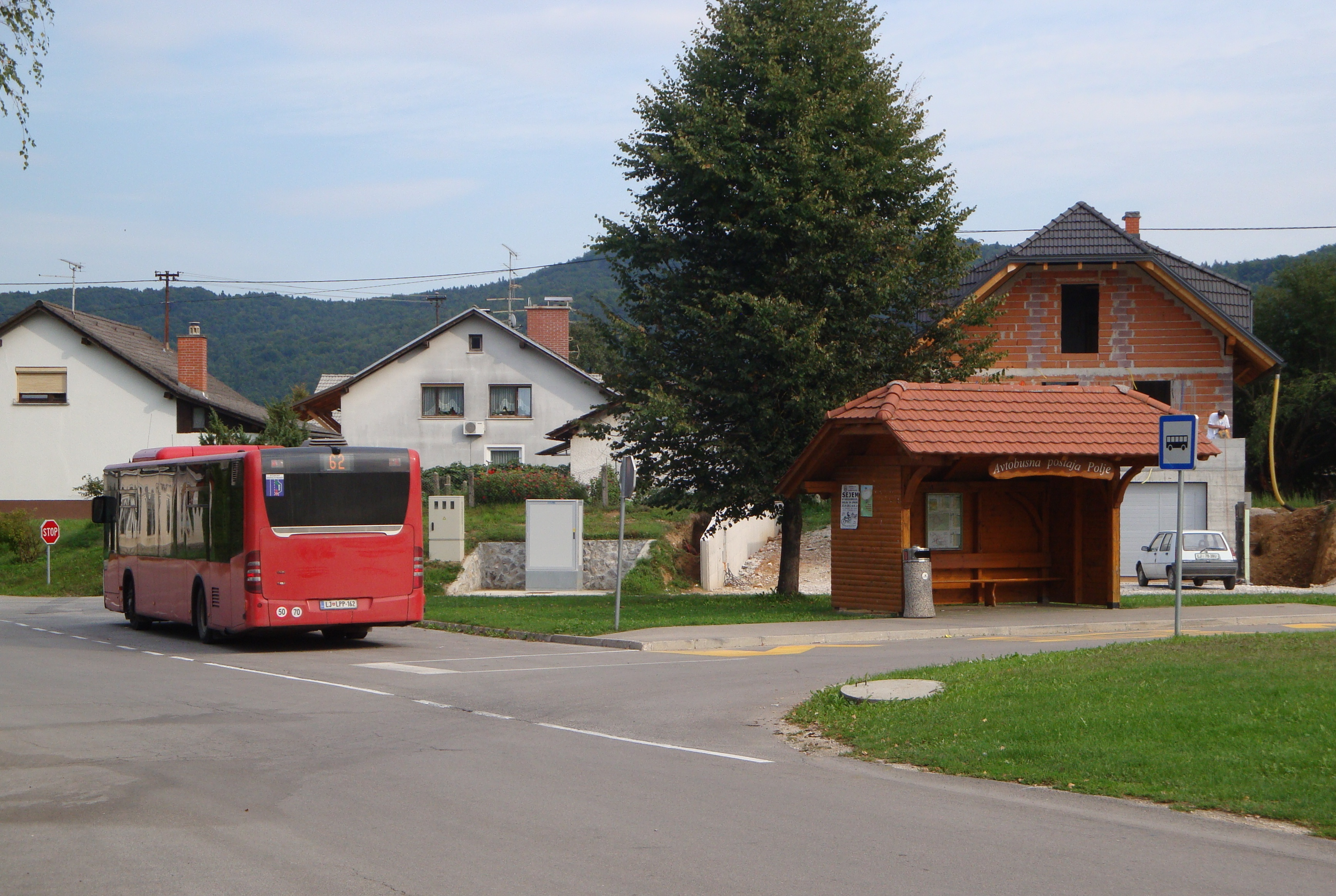 Linija 62, obračališče Polje, Vodice, Slovenija.